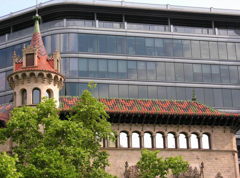 Casa Serra, a Barcelona